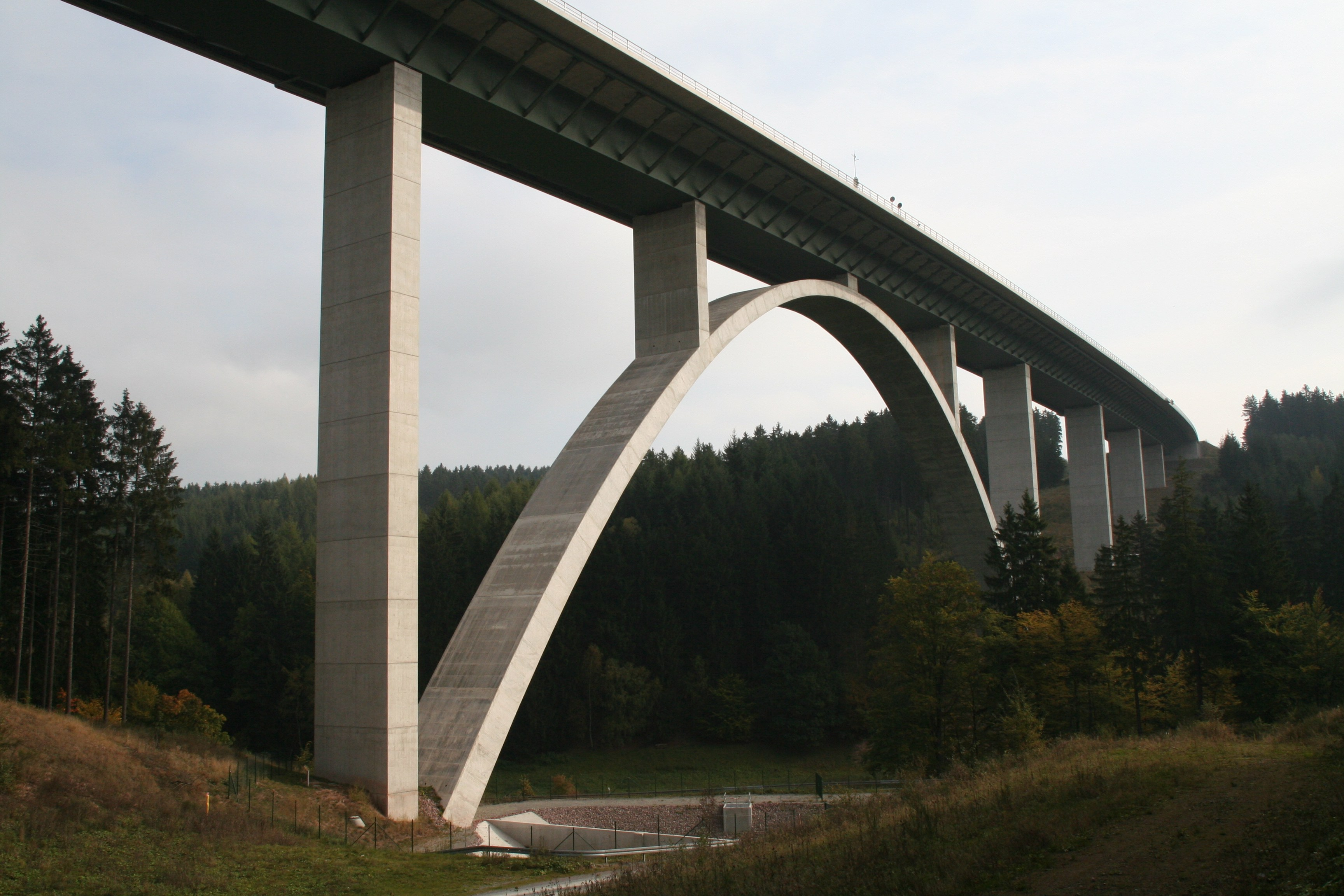 Talbrücke Albrechtsgraben, Brücke der A71 bei Suhl-Mäbendorf